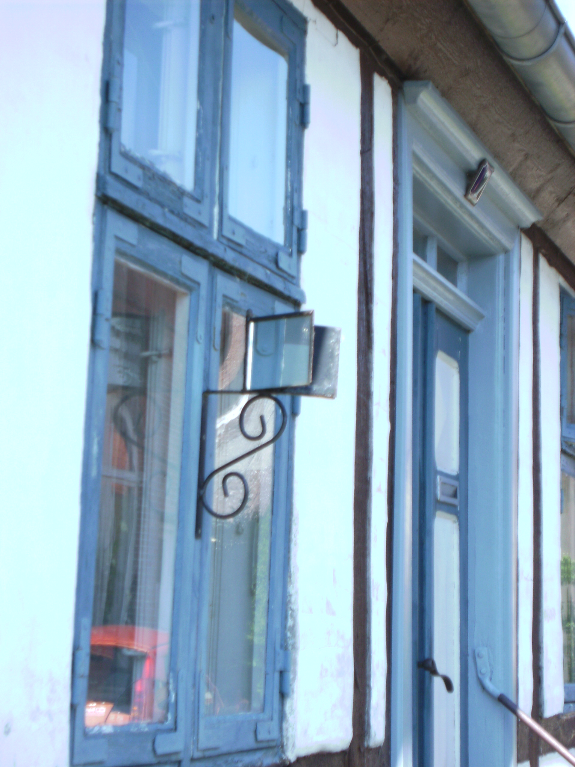 Places and houses in Nysted, Denmark Gadeprospekter og huse i Nysted, Lolland